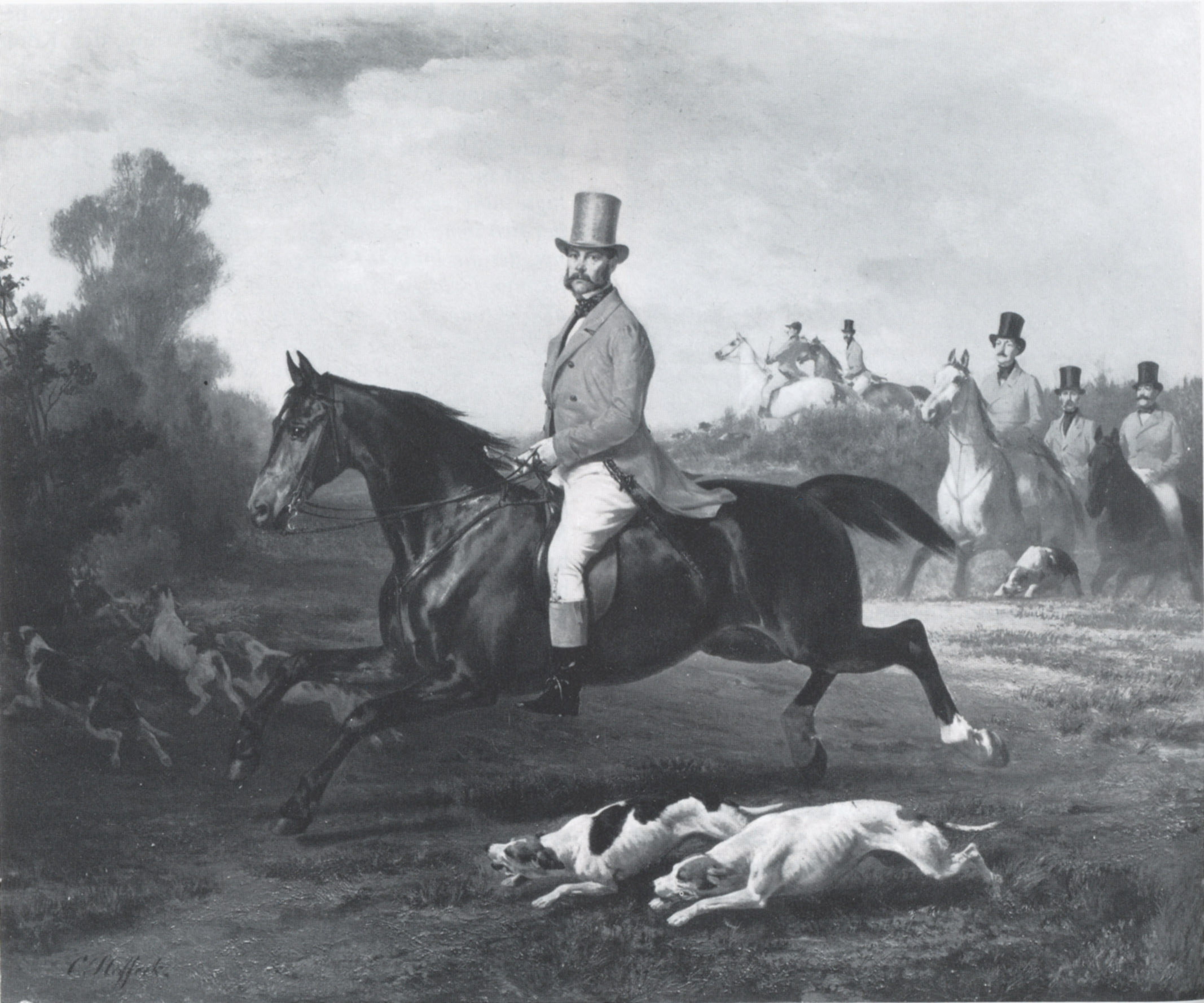 Carl Steffeck: Prinz Carl von Preußen als Roter Jäger, Ölgemälde, 1858